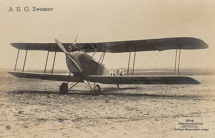 AEG C.IV reconnaissance biplane